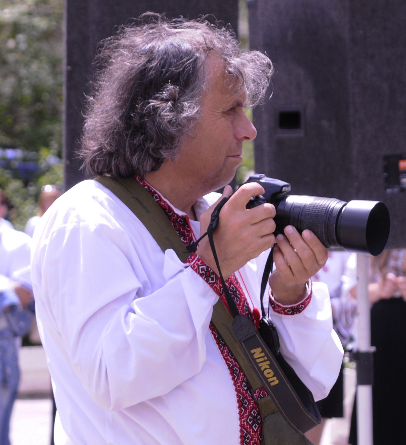 Лижечка Орест Францович